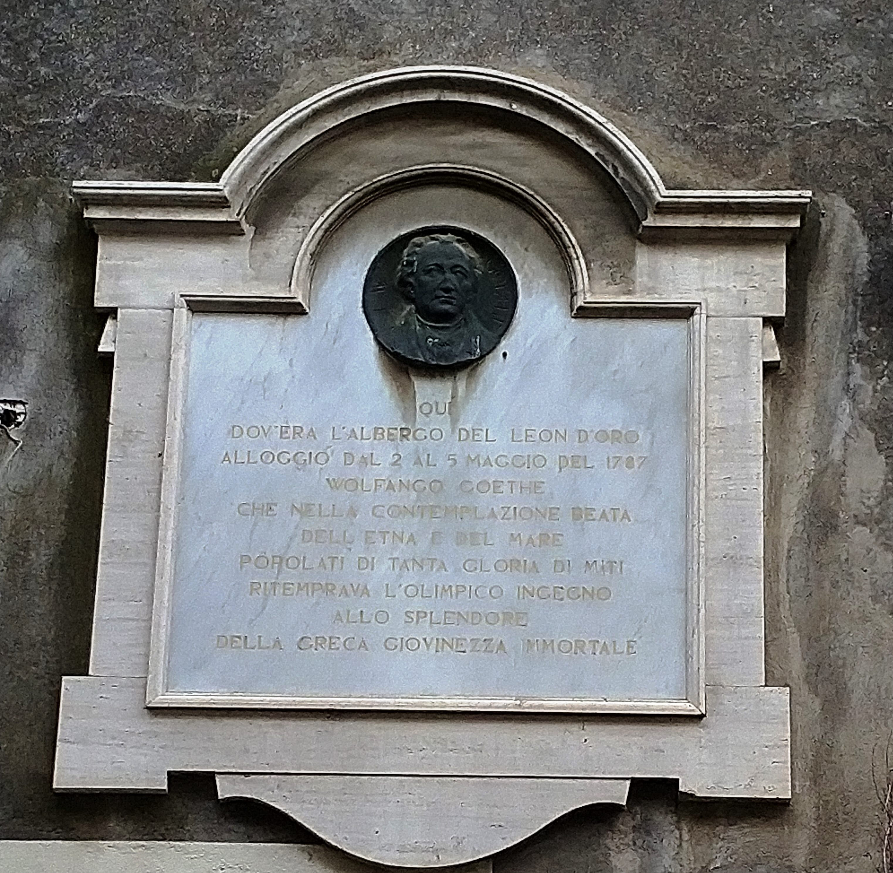 Epigrafe di Mario Rapisardi in onore a Goethe. Catania, 05.05.2018